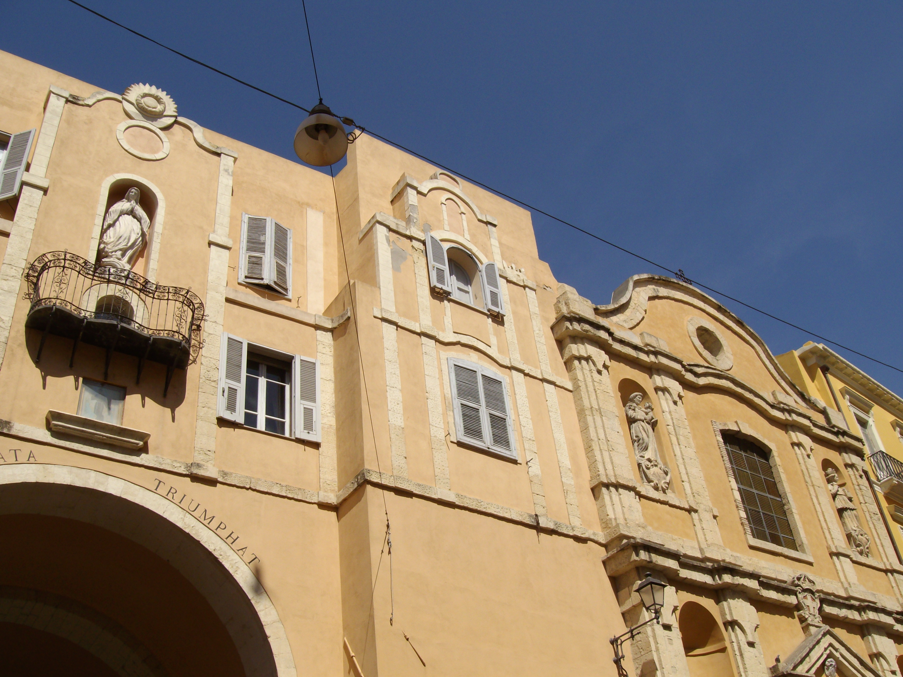 Chiesa e convento di Santa Rosalia (XVIII secolo) - Cagliari